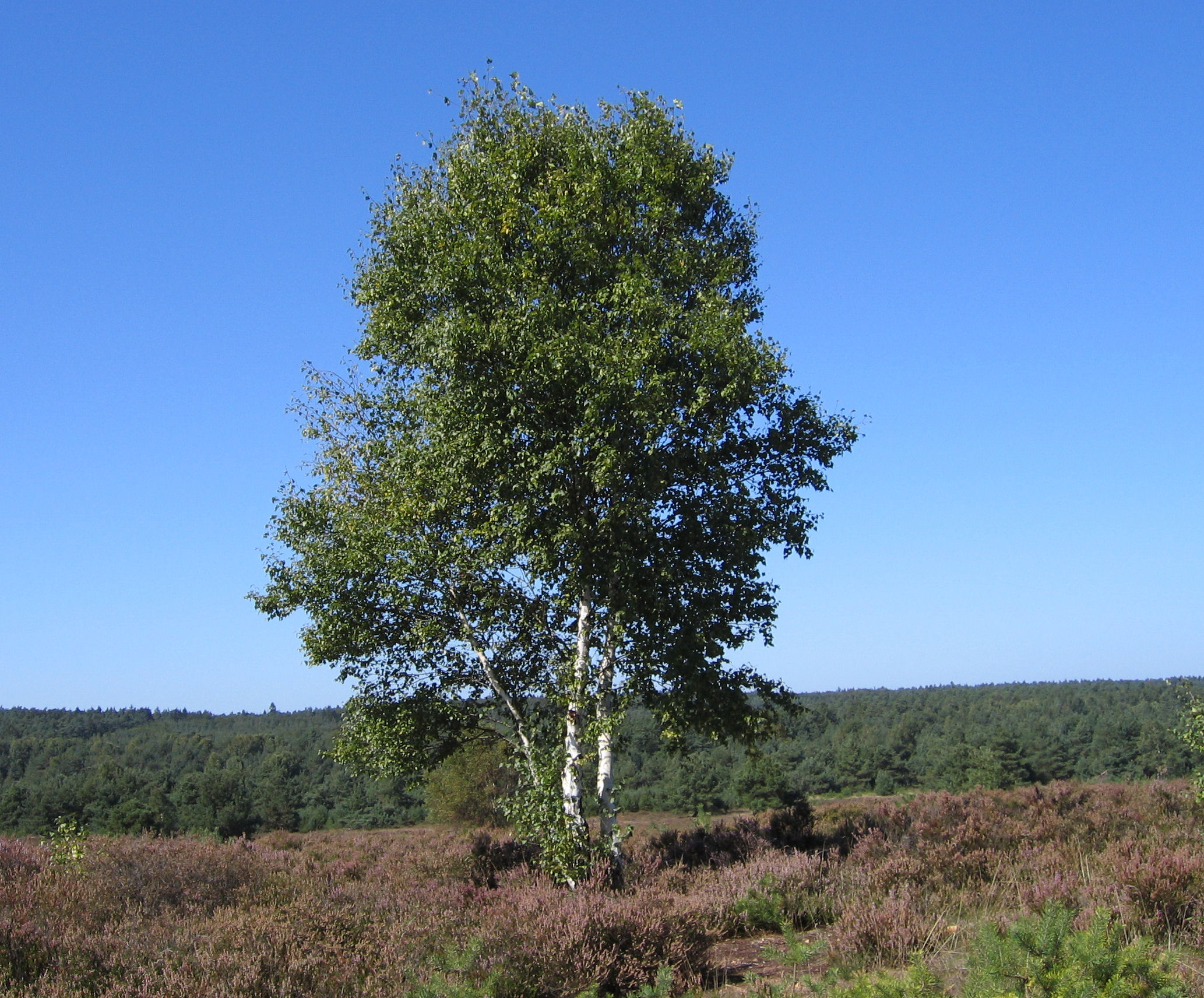 view of Mehlinger Heide, Mehlingen, Germany